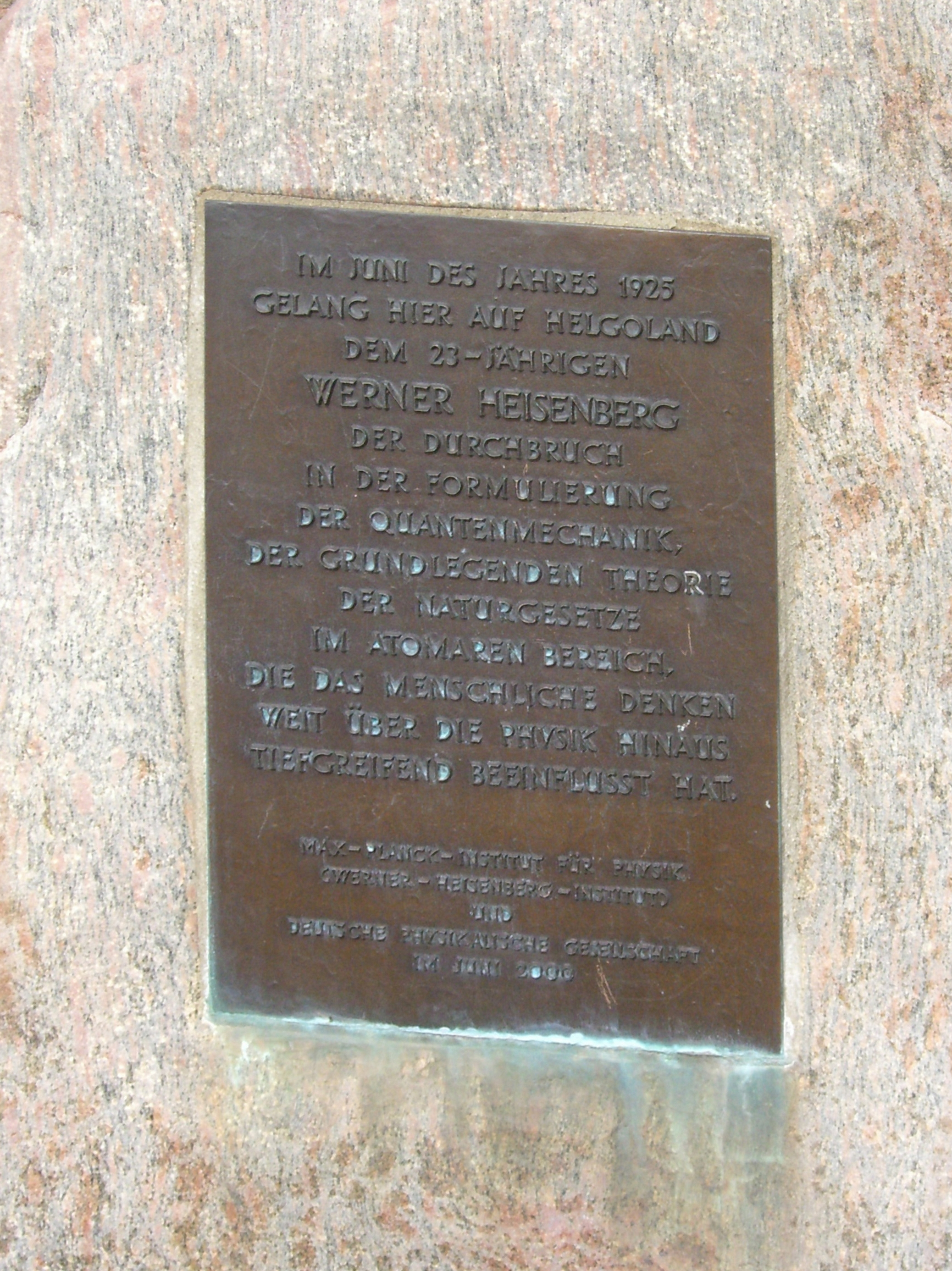 Helgoland, Tafel am Gedenkstein für Werner Heisenberg auf dem Oberland. Text: "IM JUNI DES JAHRES 1925 / GELANG HIER AUF HELGOLAND / DEM 23-JÄHRIGEN / WERNER HEISENBERG / DER DURCHBRUCH / IN DER FORMULIERUNG / DER QUANTENMECHANIK, / DER GRUNDLEGENDEN THEORIE / DER NATURGESETZE / IM ATOMAREN BEREICH, / DIE DAS MENSCHLICHE DENKEN / WEIT ÜBER DIE PHYSIK HINAUS / TIEFGREIFEND BEEINFLUSST HAT. // MAX-PLANCK-INSTITUT FÜR PHYSIK / (WERNER-HEISENBERG-INSTITUT) / UND / DEUTSCHE PHYSIKALISCHE GESELLSCHAFT / IM JUNI 2000"